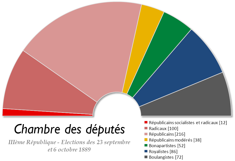 Chambre des députés française issue des élections législatives de 1889